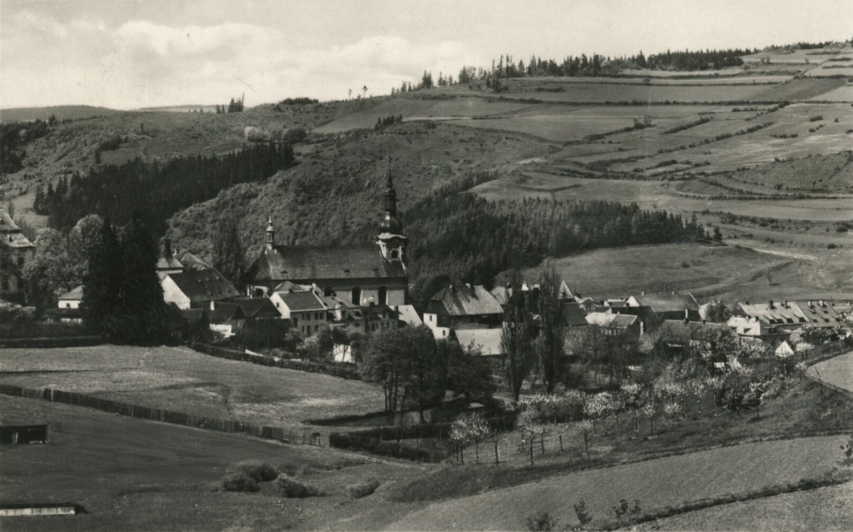 Sudetenland, Duppau, Ansichtskarte, Verlag: Kaplan, gelaufen 1941